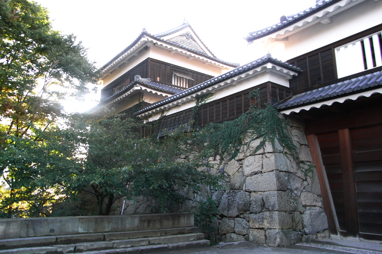 上田城の城門。